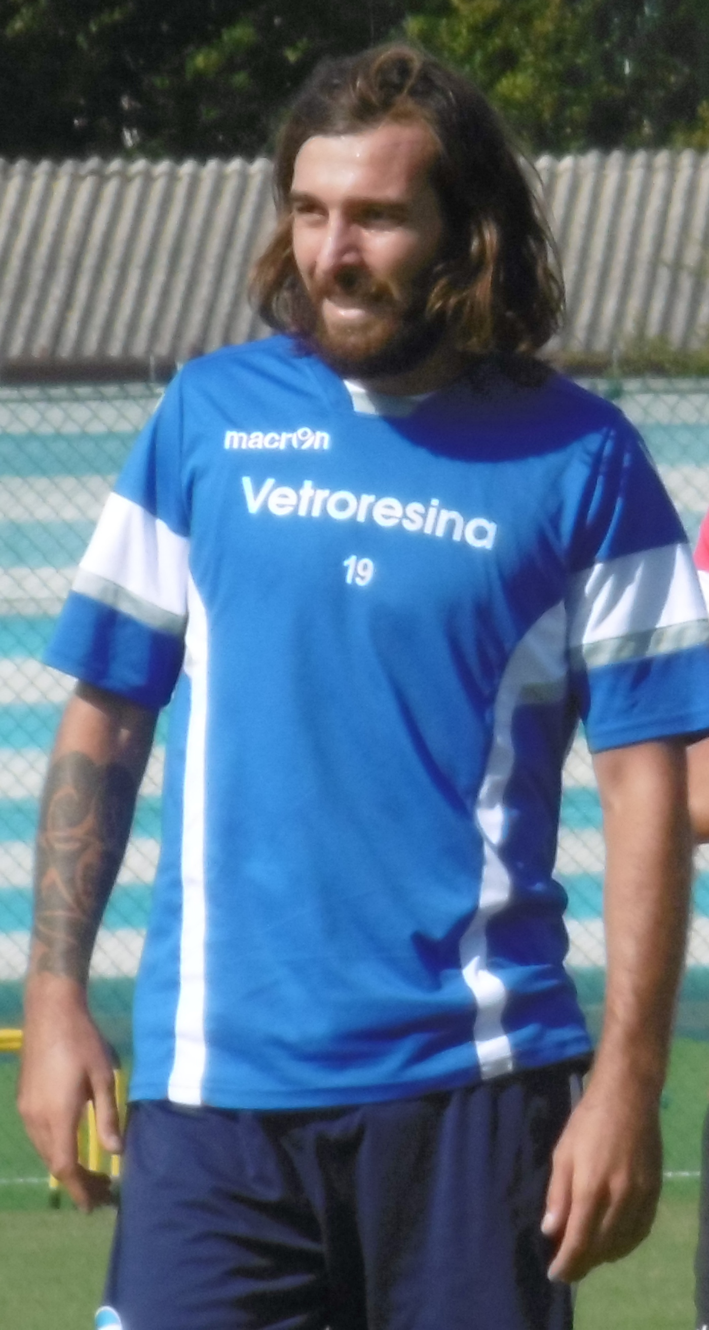 Luca Mora giocatore della Spal